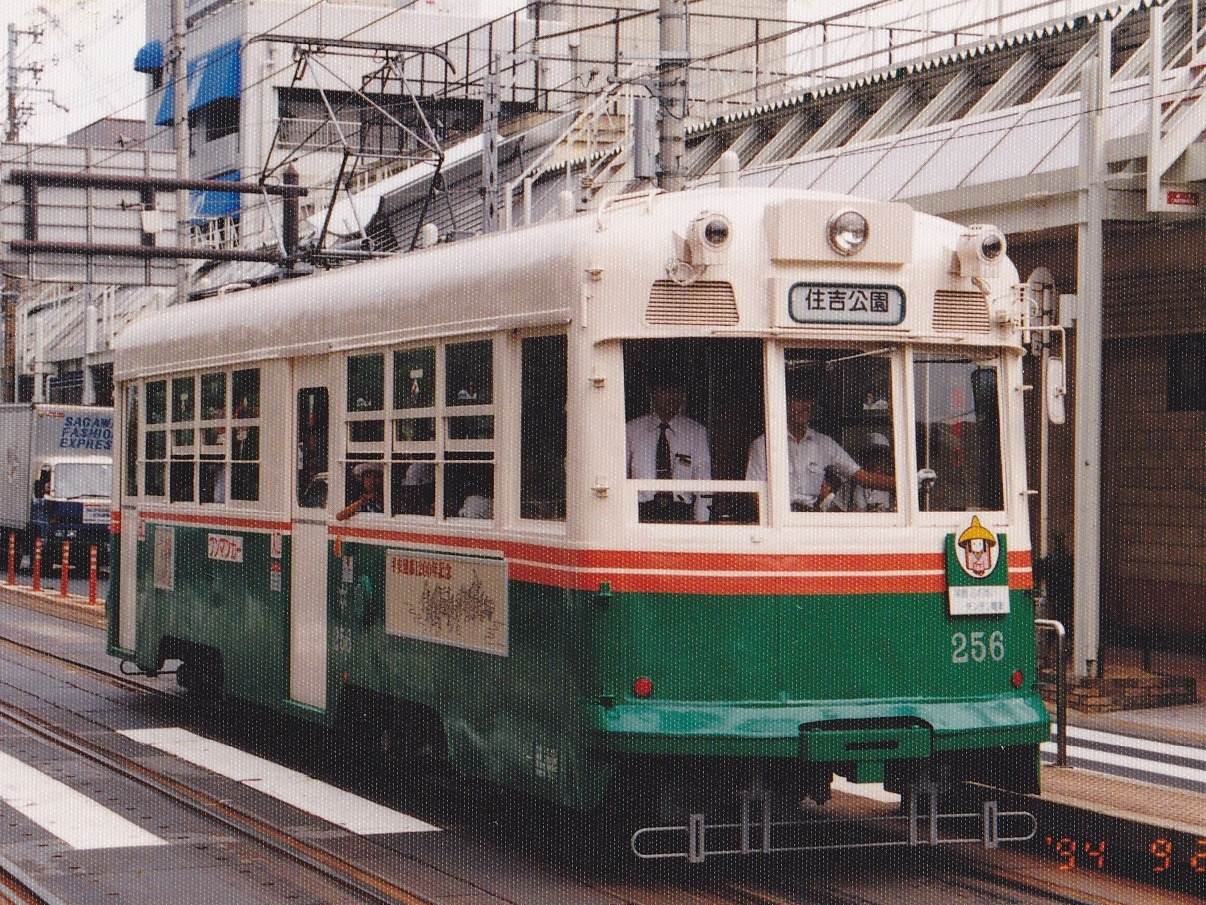 平安遷都1200年記念で京都市電色に復元された256号車（1994年9月24日撮影）